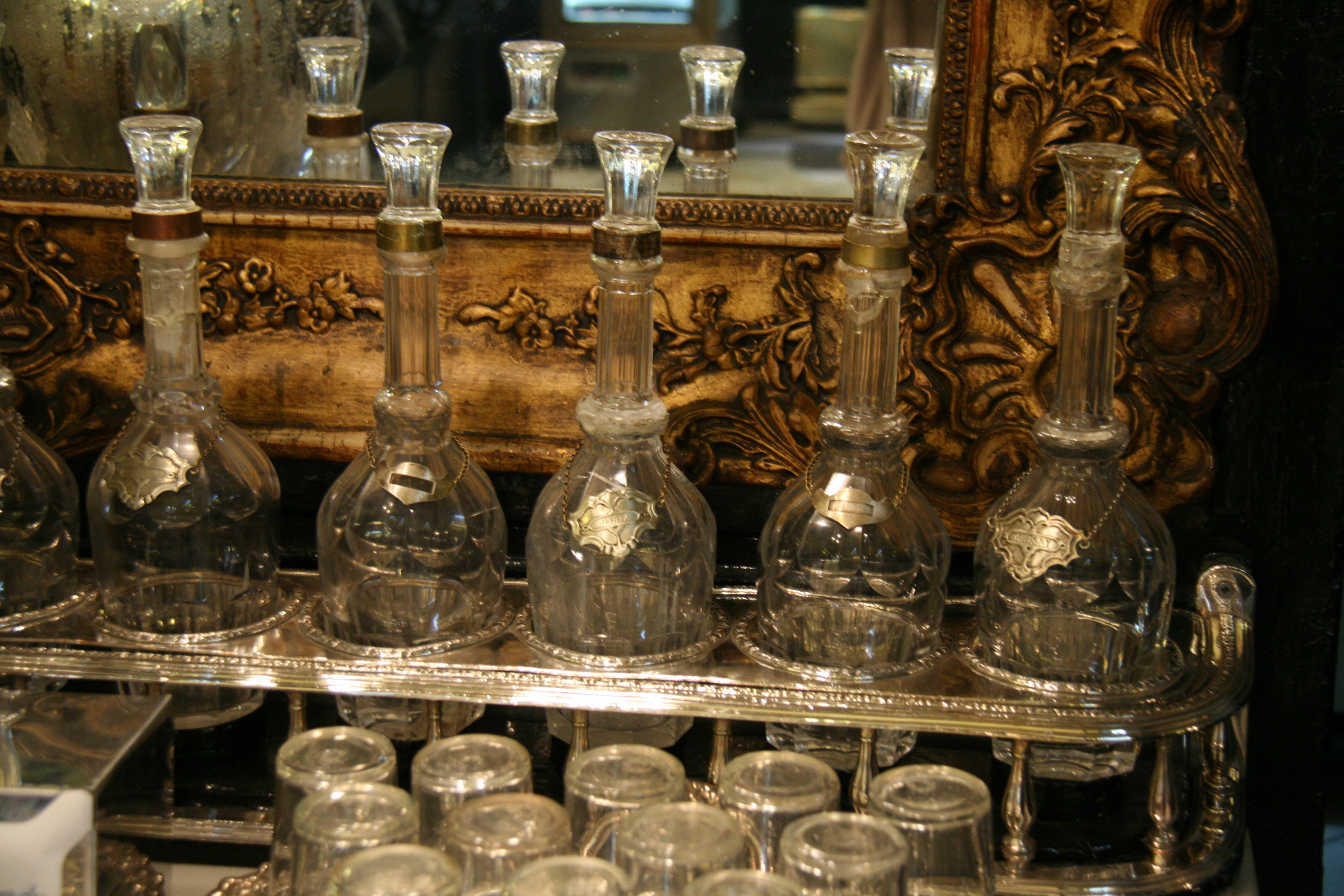 Botellas (limetas) junto al espejo isabelino- Lhardy (Madrid)